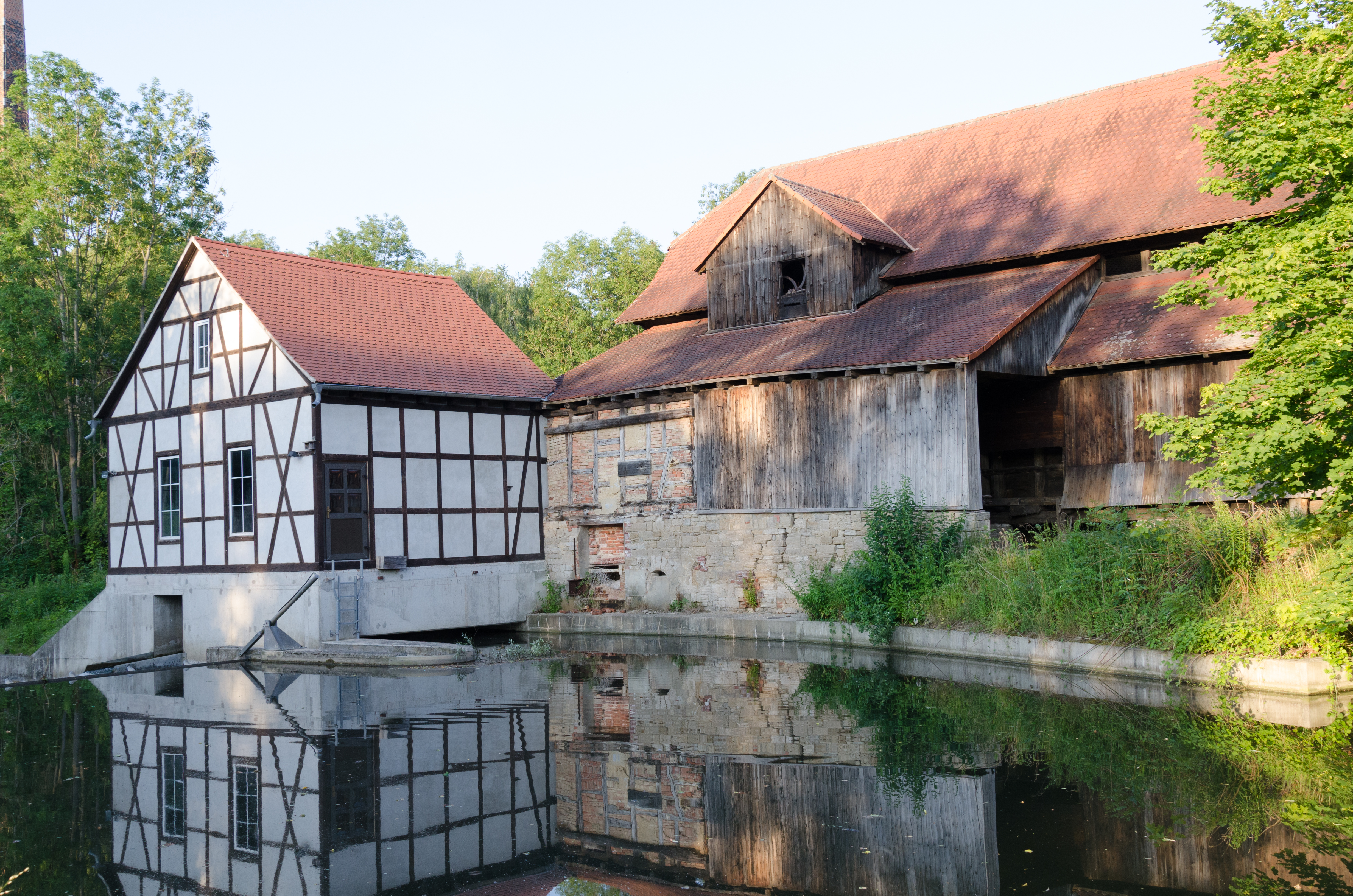 Bad Sulza, Ensemble Saline, Gradierwerk